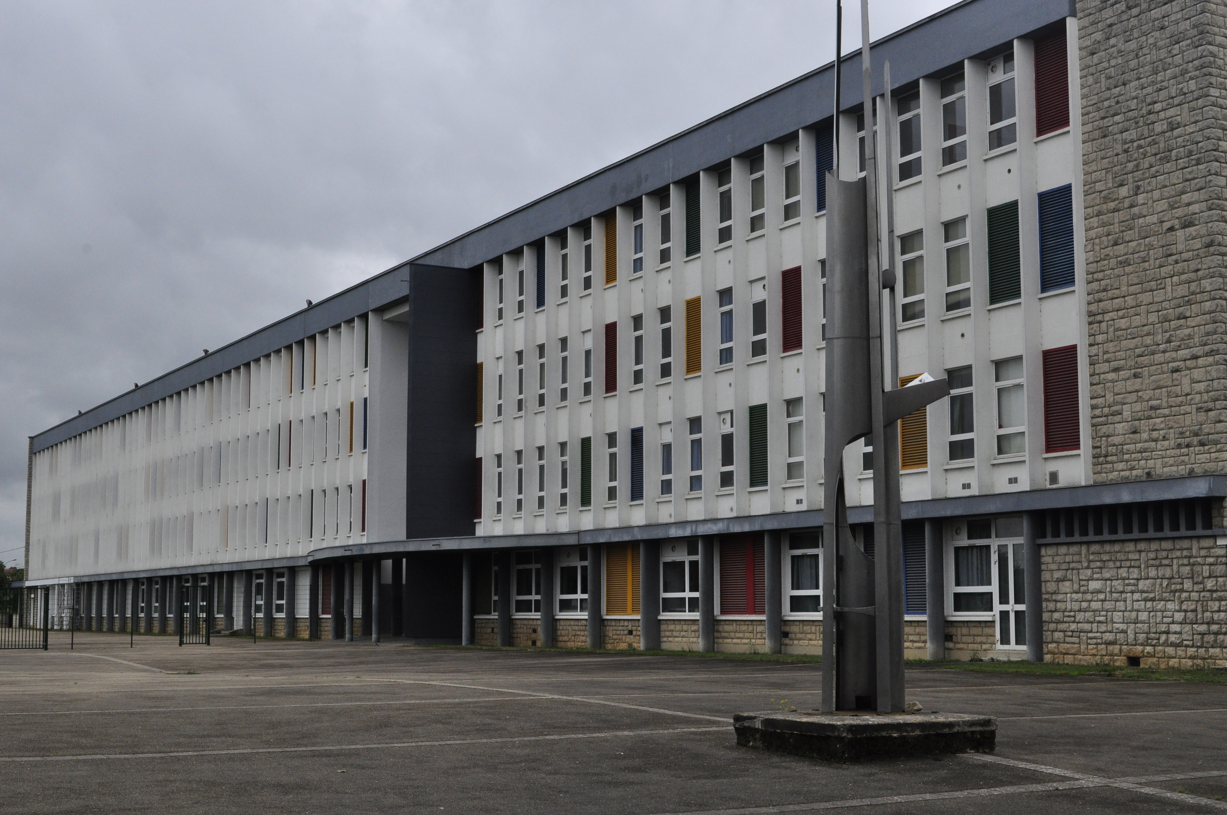 Cité scolaire François Ier de Vitry-le-François (51300) : bâtiment Doré et collège.